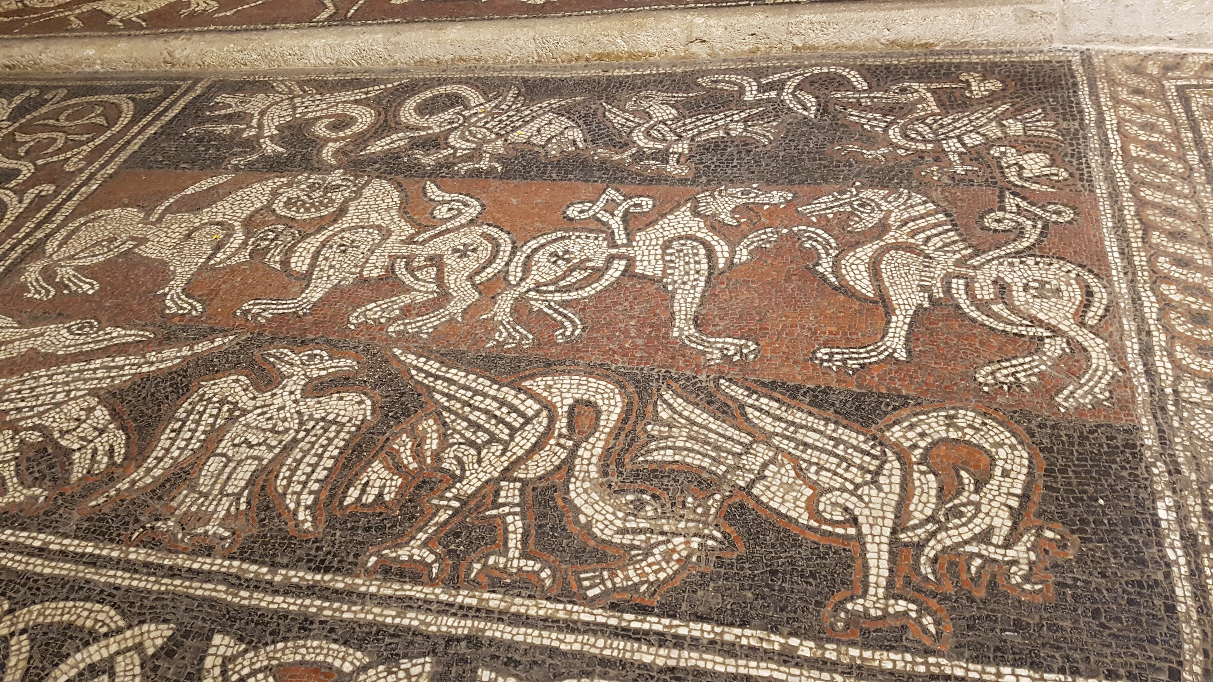 Une partie du bestiaire fantastique des mosaïques de l'abbaye de Ganagobie France